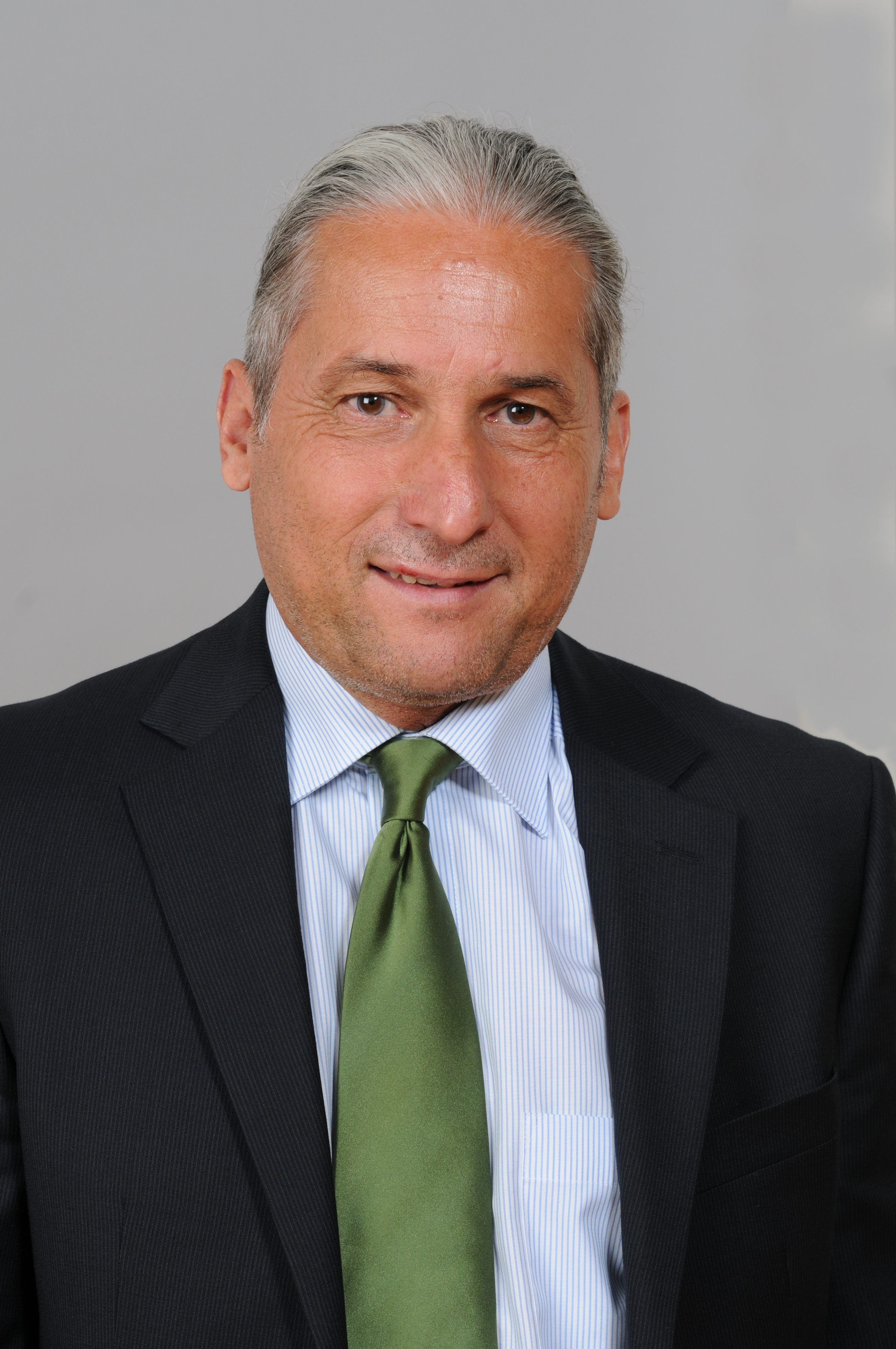 Emmerich Weiderbauer. Abgeordnete zum Landtag von Niederösterreich.